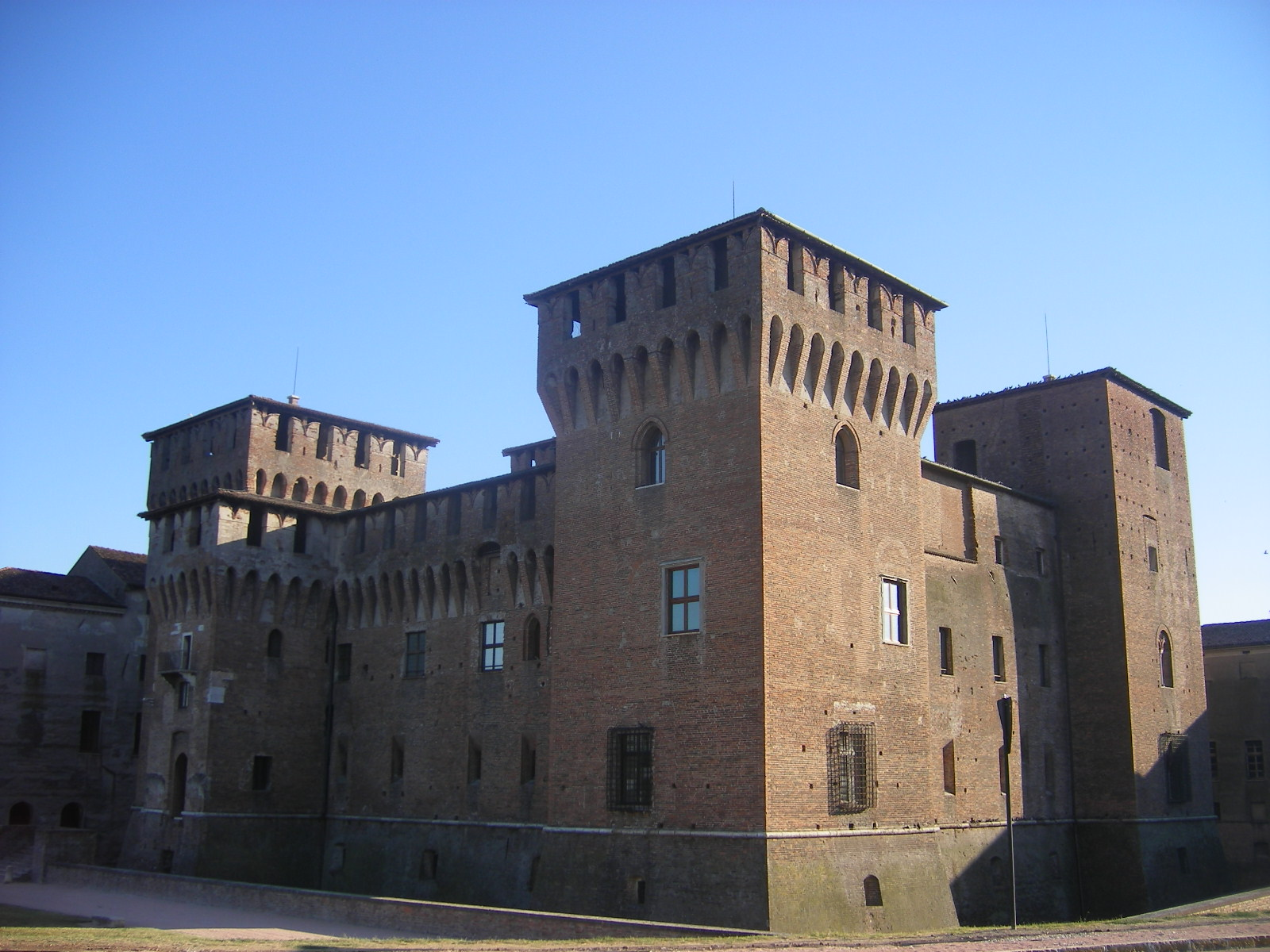 Mantova